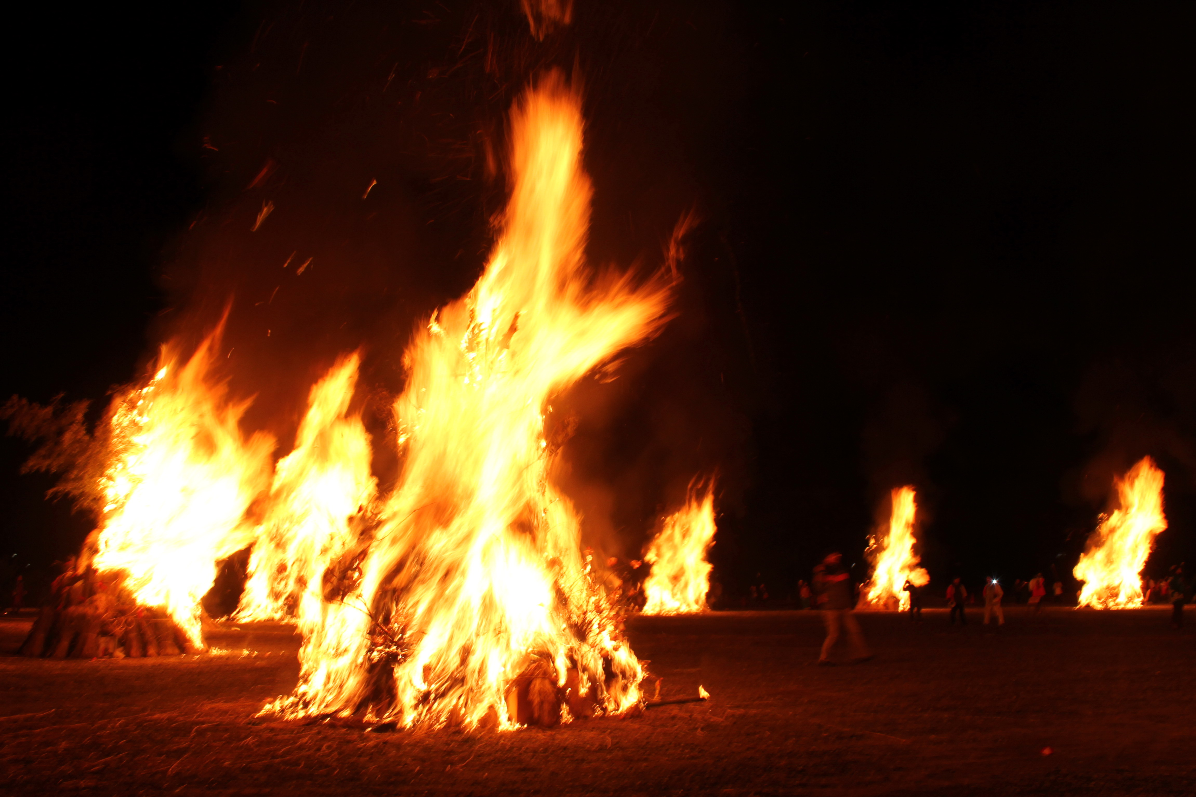 勝山左義長で行われるドンド焼き